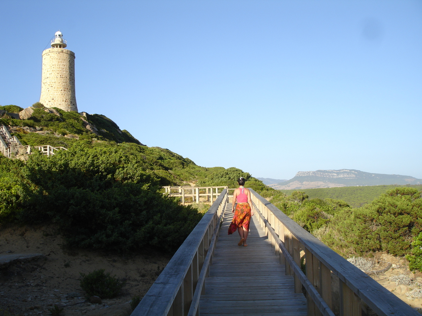 Faro de Punta Camarinal